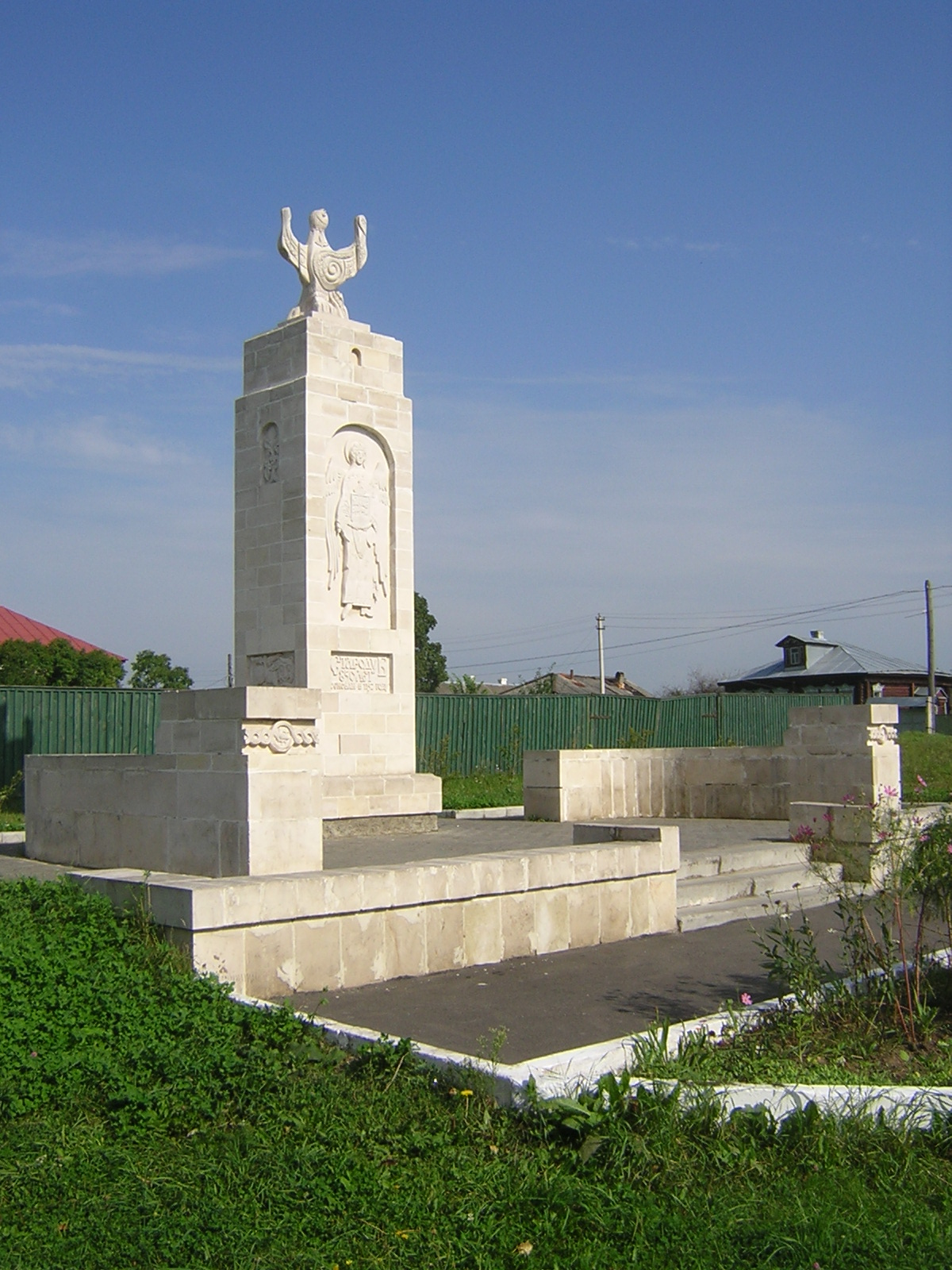 Starodub-on-the-Klyazma, 850 Ann. Memorial. Russia, Vladimir region. Стародуб-на-Клязьме (н. Клязьминский городок), Россия, Владимирская обл. Памятный знак в честь 850-летия.